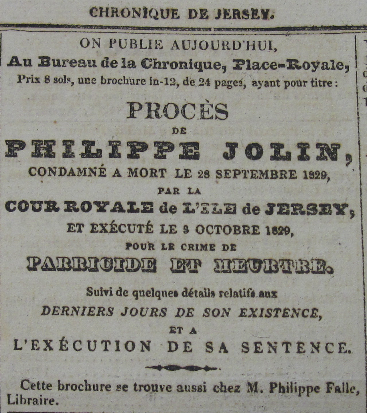 Chronique de Jersey: Procès de Philippe Jolin, condamné a mort le 28 Septembre 1829, par la Cour Royale de l'Ile de Jersey, et exécuté le 3 Octobre 1829, pour le crime de parricide et meurtre. Suivi de quélques détails relatifs aux derniers jours de son existence, et a l'exécution de sa sentence.